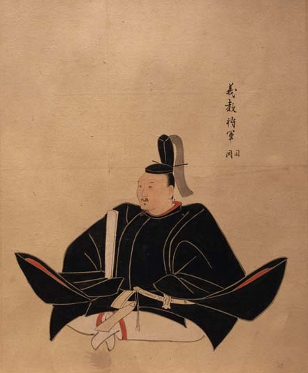 足利義教像（古画類聚）